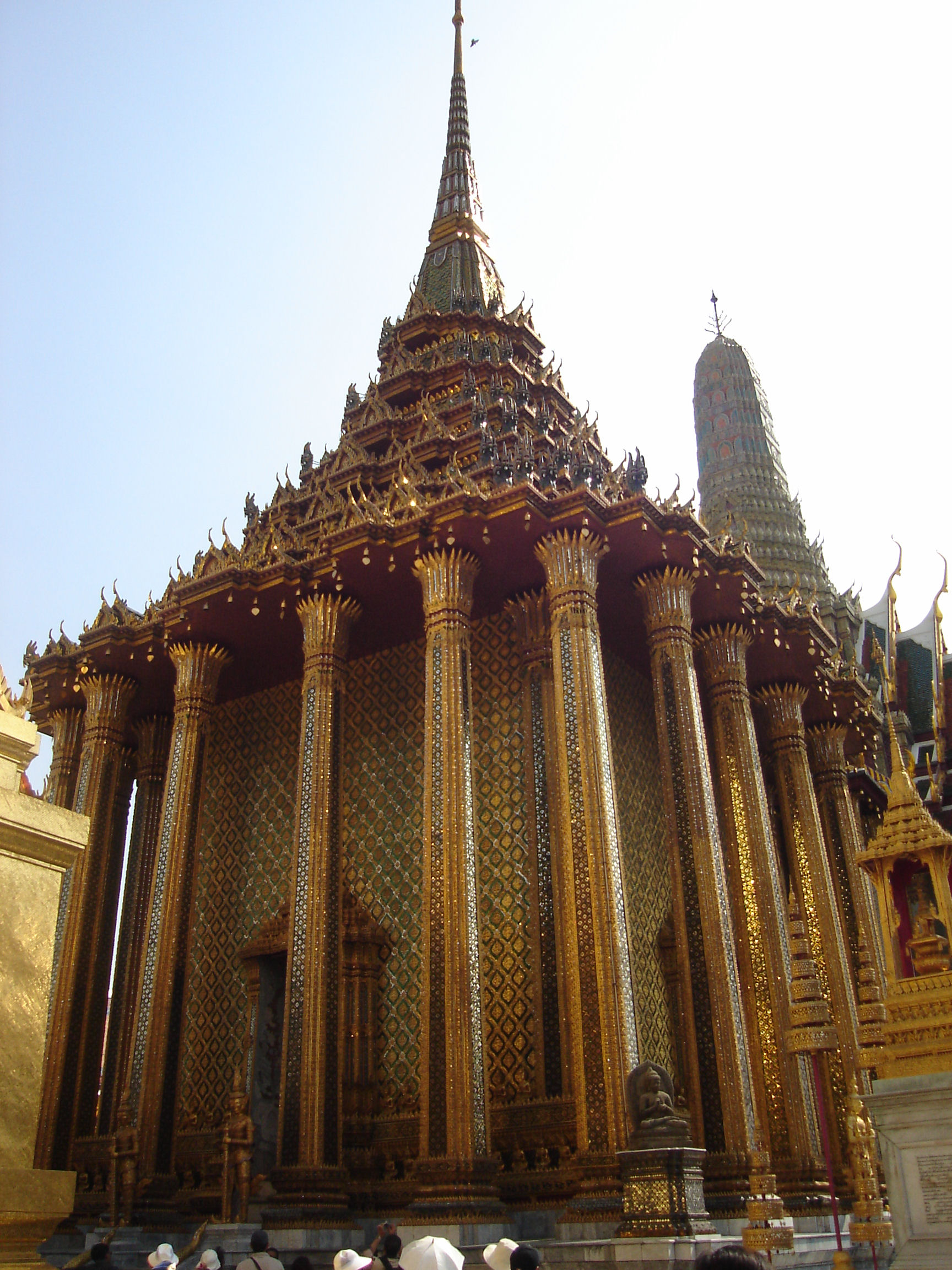 Phra Mondop at Wat Phra Kaeo in Bangkok Thailand